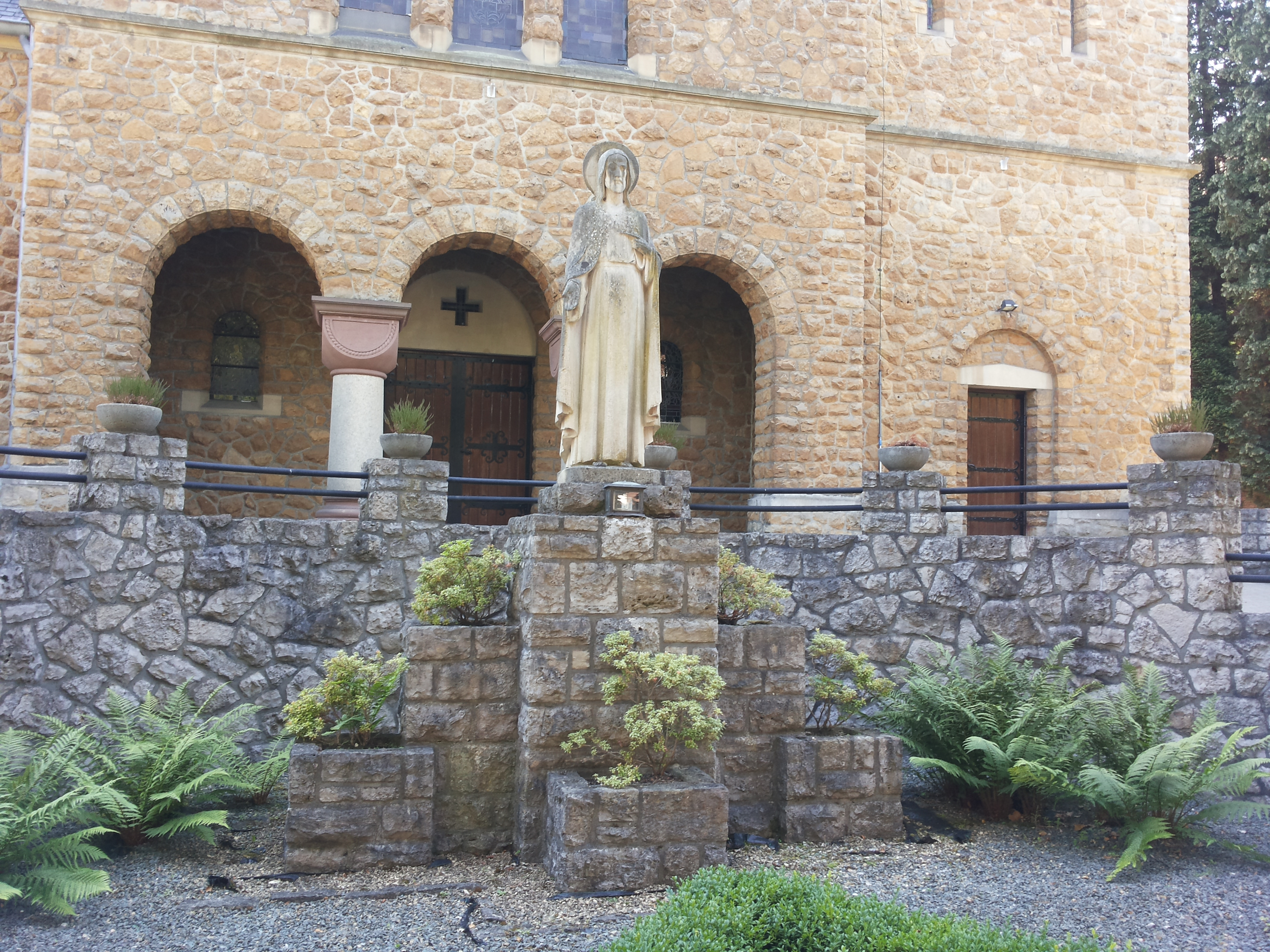 Heilig Hartbeeld voor de Heilig Hart van Jezuskerk, Haanrade, Kerkrade, Limburg, Nederland